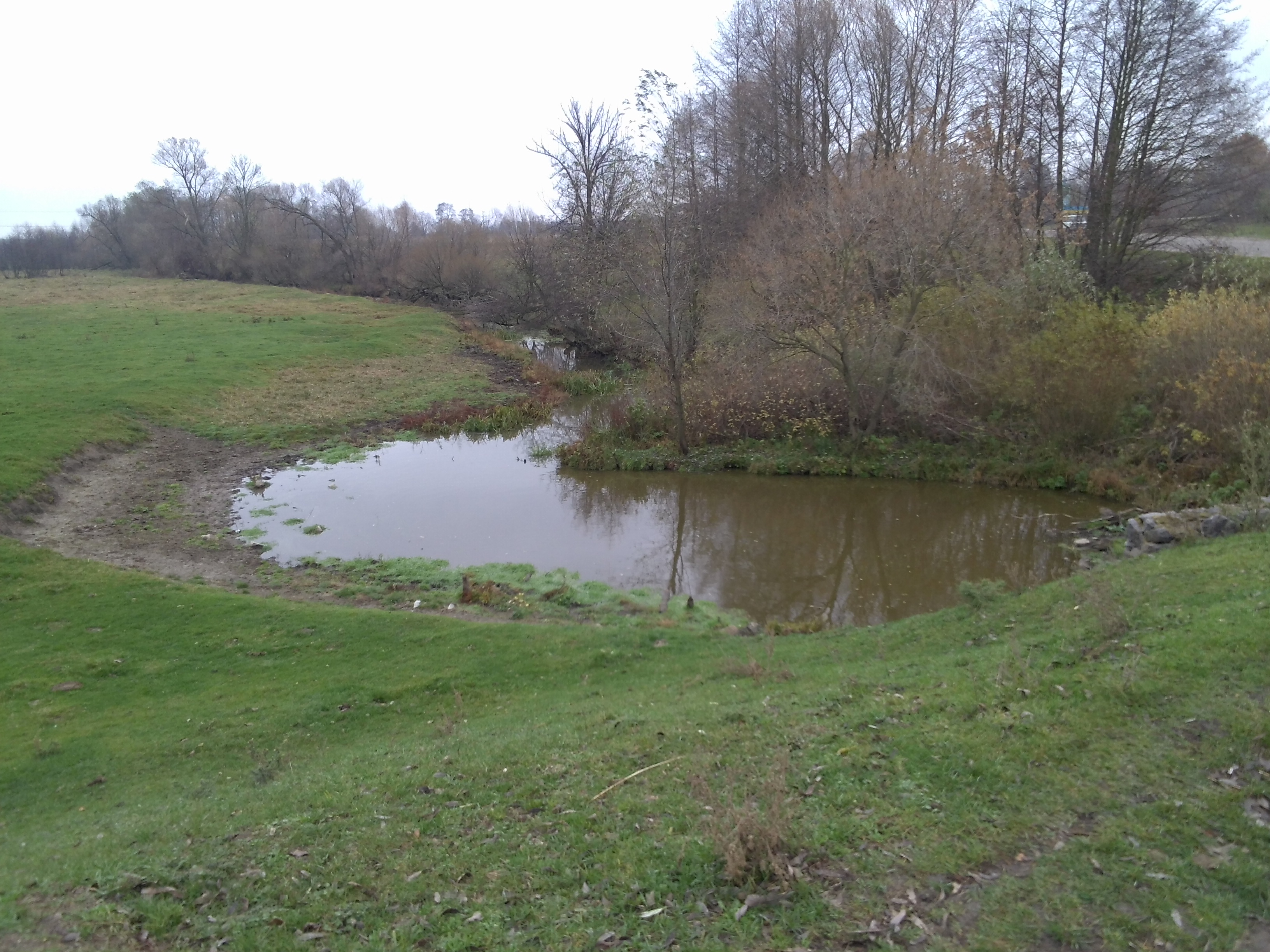 с. Косаківка. Річка поблизу межі з селом Коханівка